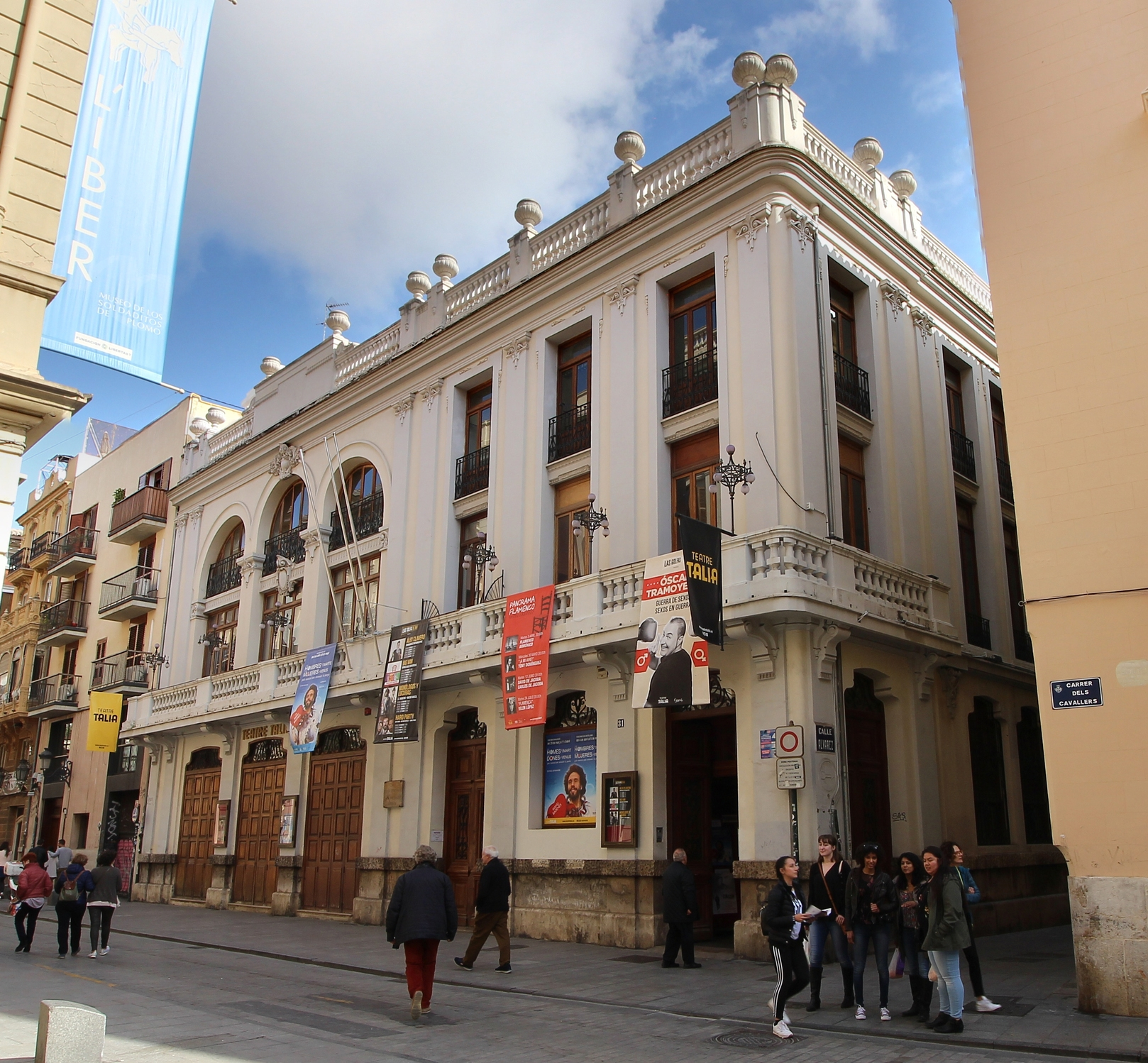 Teatro Talía de Javier Goerlich Lleó inaugurado en 1928 en Valencia